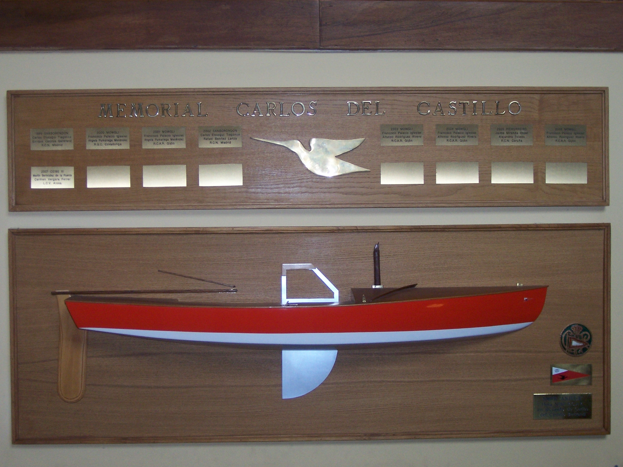 Metopa Memorial Carlos del Castillo